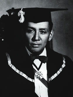 Dr. Eduardo Morales Miranda, rector fundador de la Universidad Austral de Chile